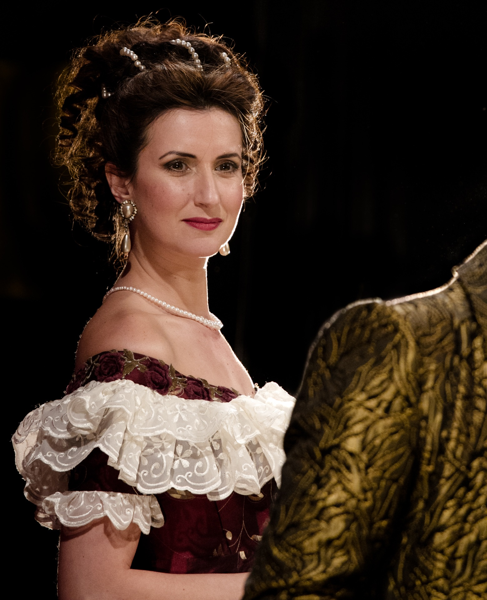 נילי צרויה בתפקיד ארמין מתוך הרוזן ממונטה כריסטו ת. באר שבע